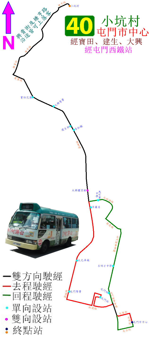 中文（香港）: 新界專線小巴40路線的走線圖